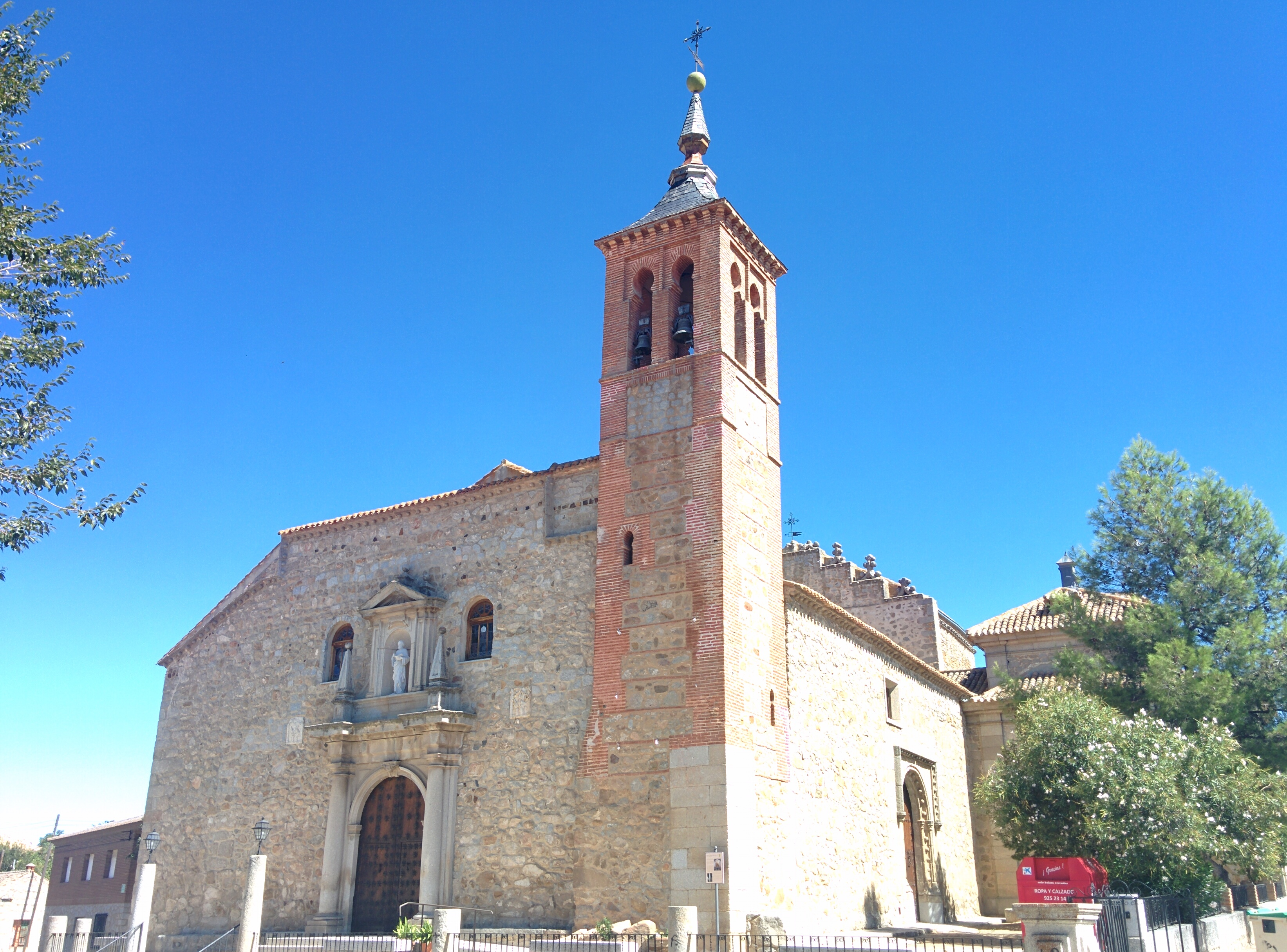 Iglesia de San Pedro Apóstol, en Las Ventas con Peña Aguilera (Toledo, España).